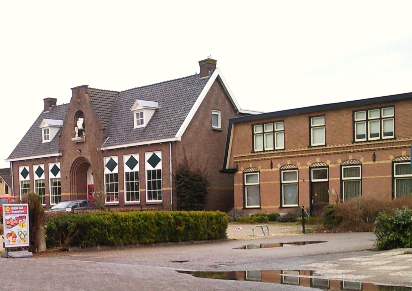 Uitgaanscentrum De Til aan de Hamersveldseweg in het centrum van Leusden aan het Tilplein. Het linkerpand op de foto dateert uit de jaren '20.